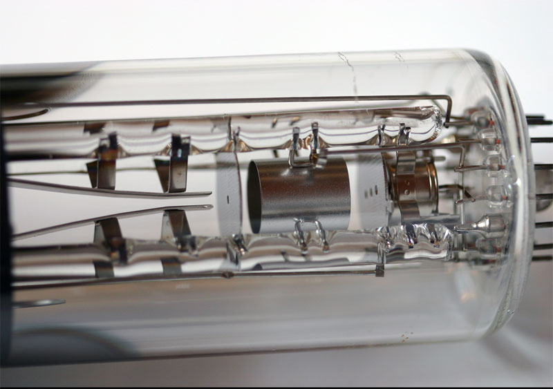 Kathodestraalbuis (kanon), eigen foto september 2004, hiermee onder GFDL gebracht